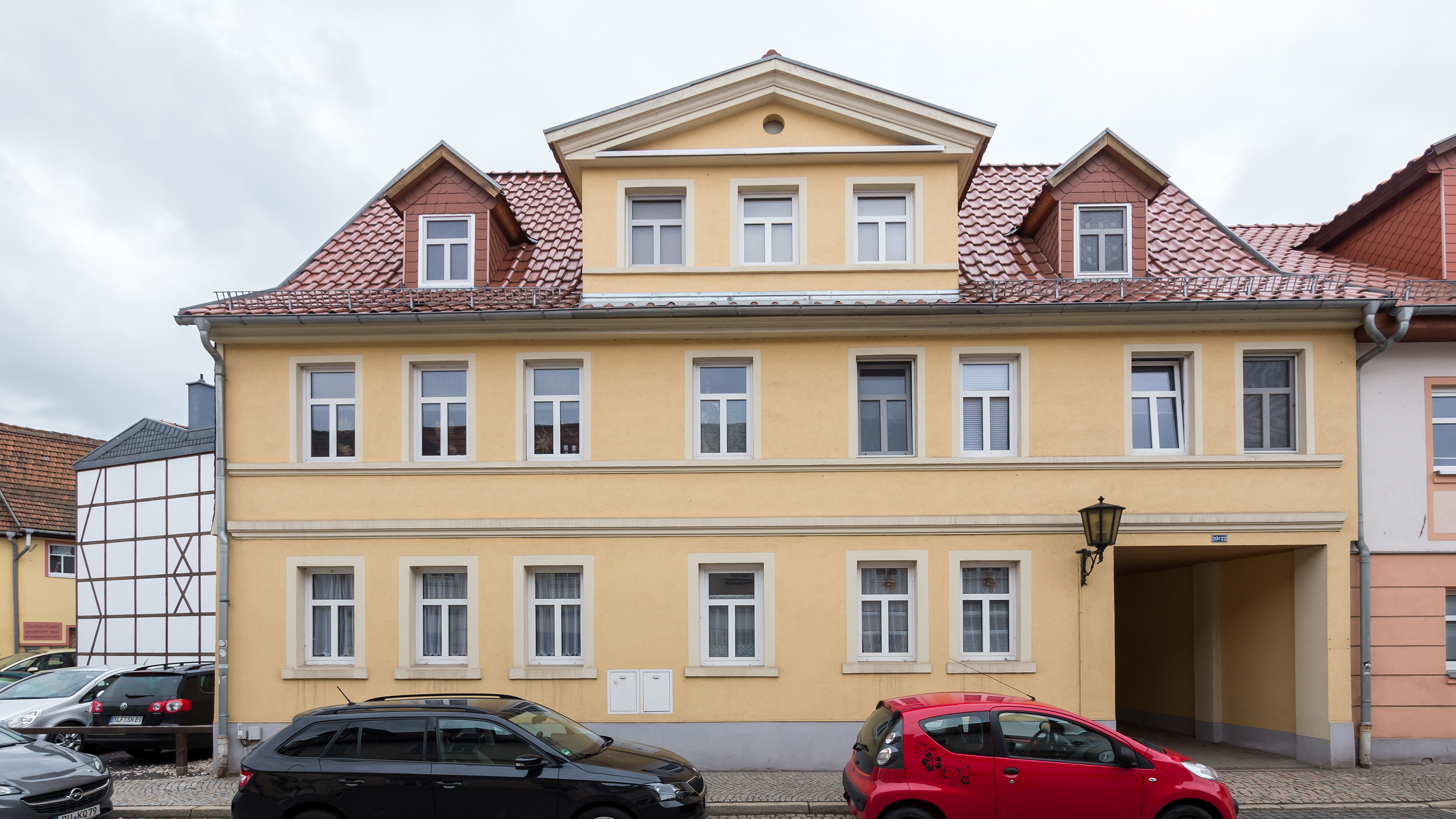 Saalfeld Niedere Köditzgasse 22 I